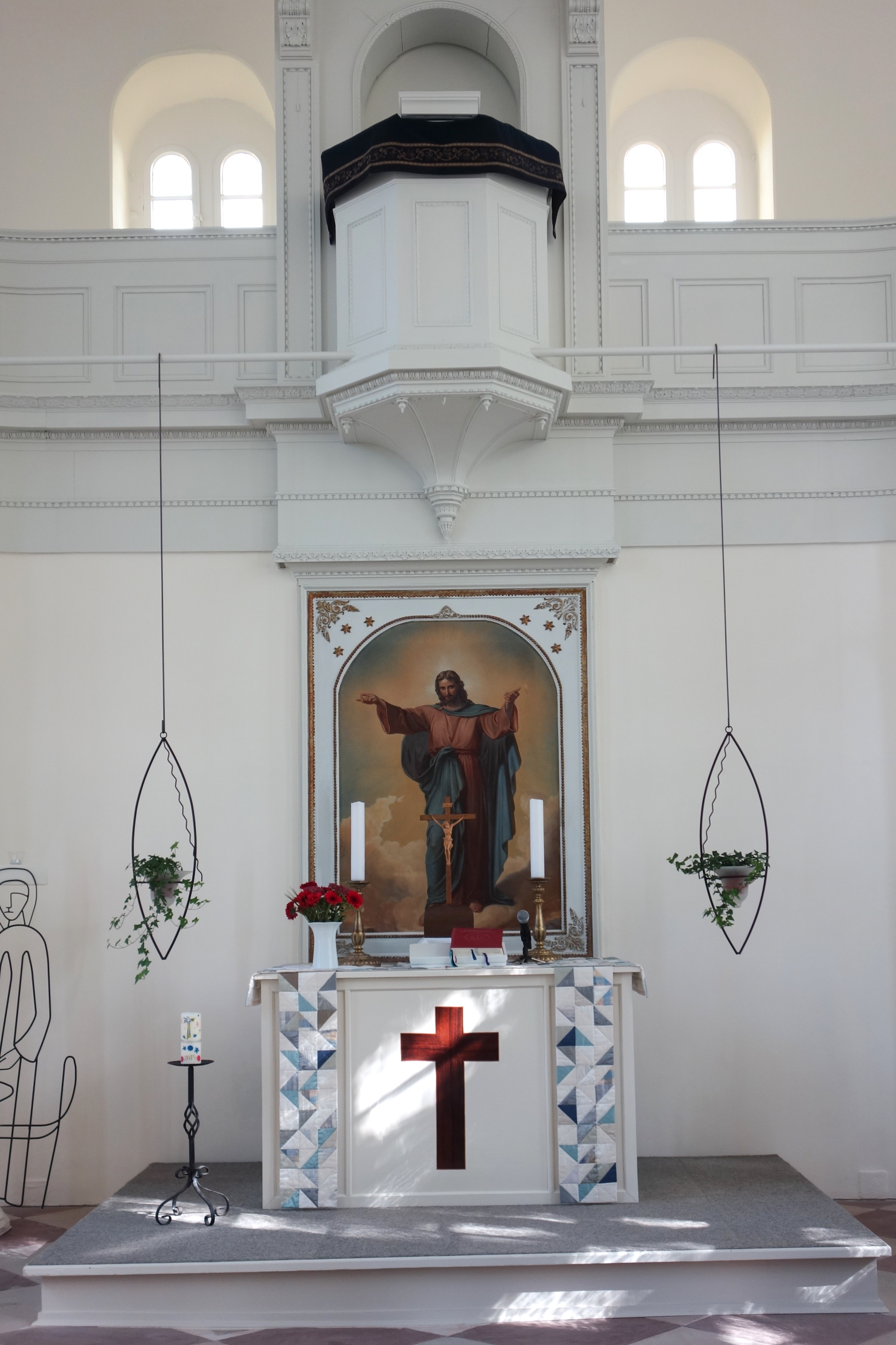 Die Christuskirche von Salzgitter-Gitter - Altar und Kanzel